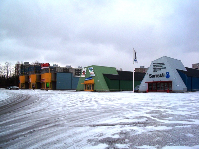 Laki I kvartal (Kadaka asum). Kadaka tee äärsed ärihooned. Tallinn